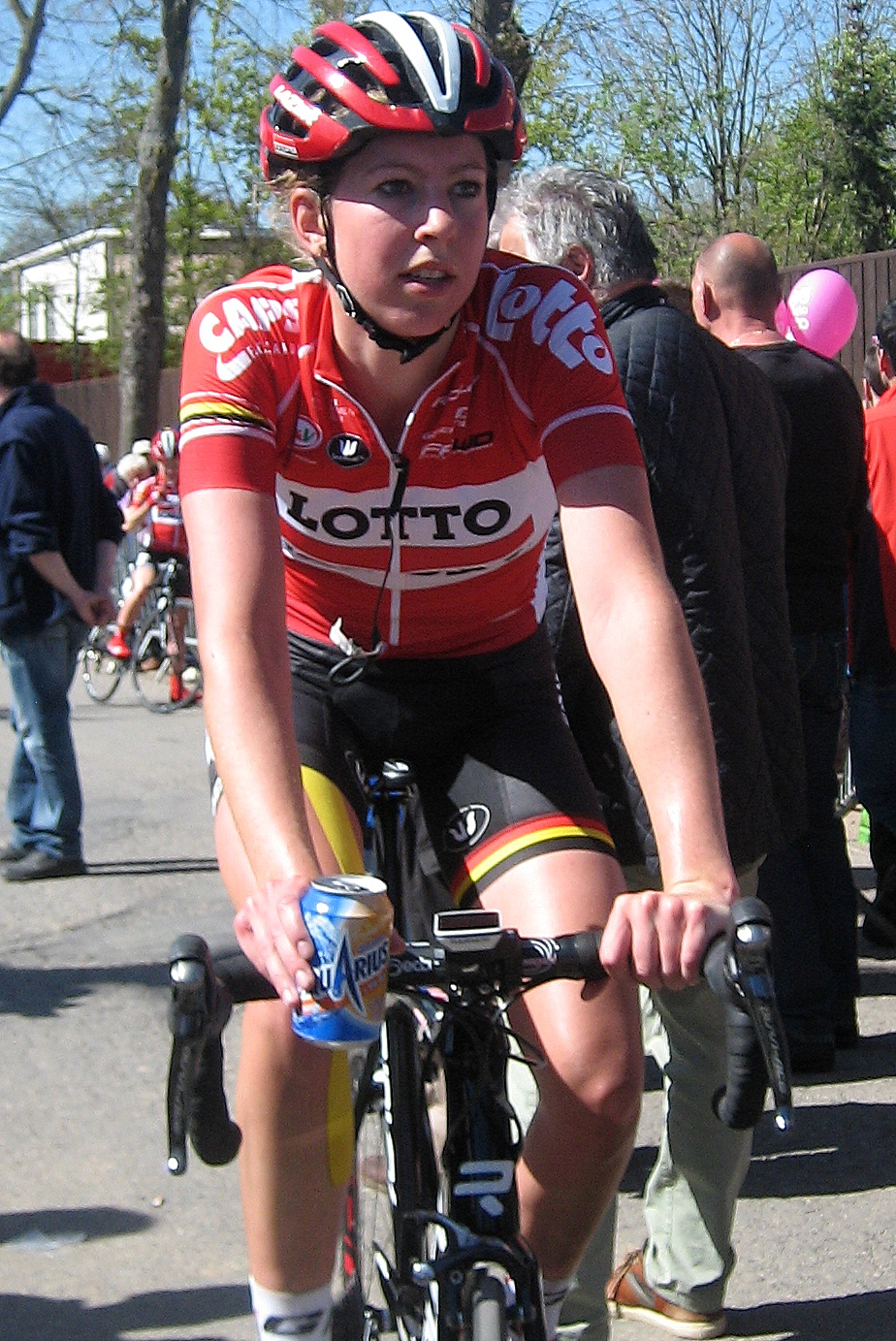 Willeke Knol (Lotto Soudal Ladies) na finish Waalse Pijl 2016